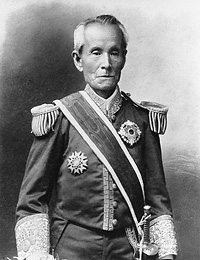 a Japanese man 東久世通禧 (Michitomi Higashikuze)